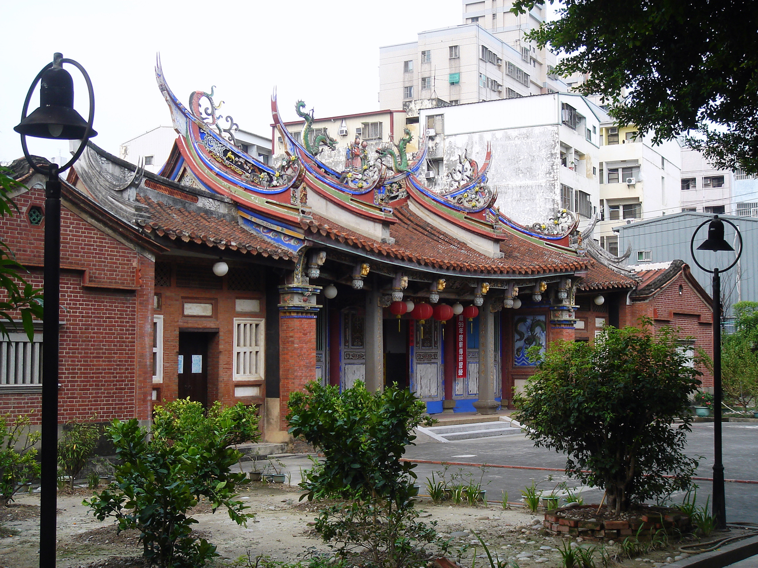 臺中張廖家廟。